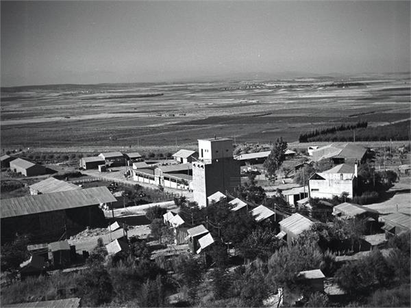 הזורע - (יקנעם) מראה כללי